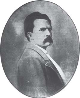 Retrato de Jorge Issacs